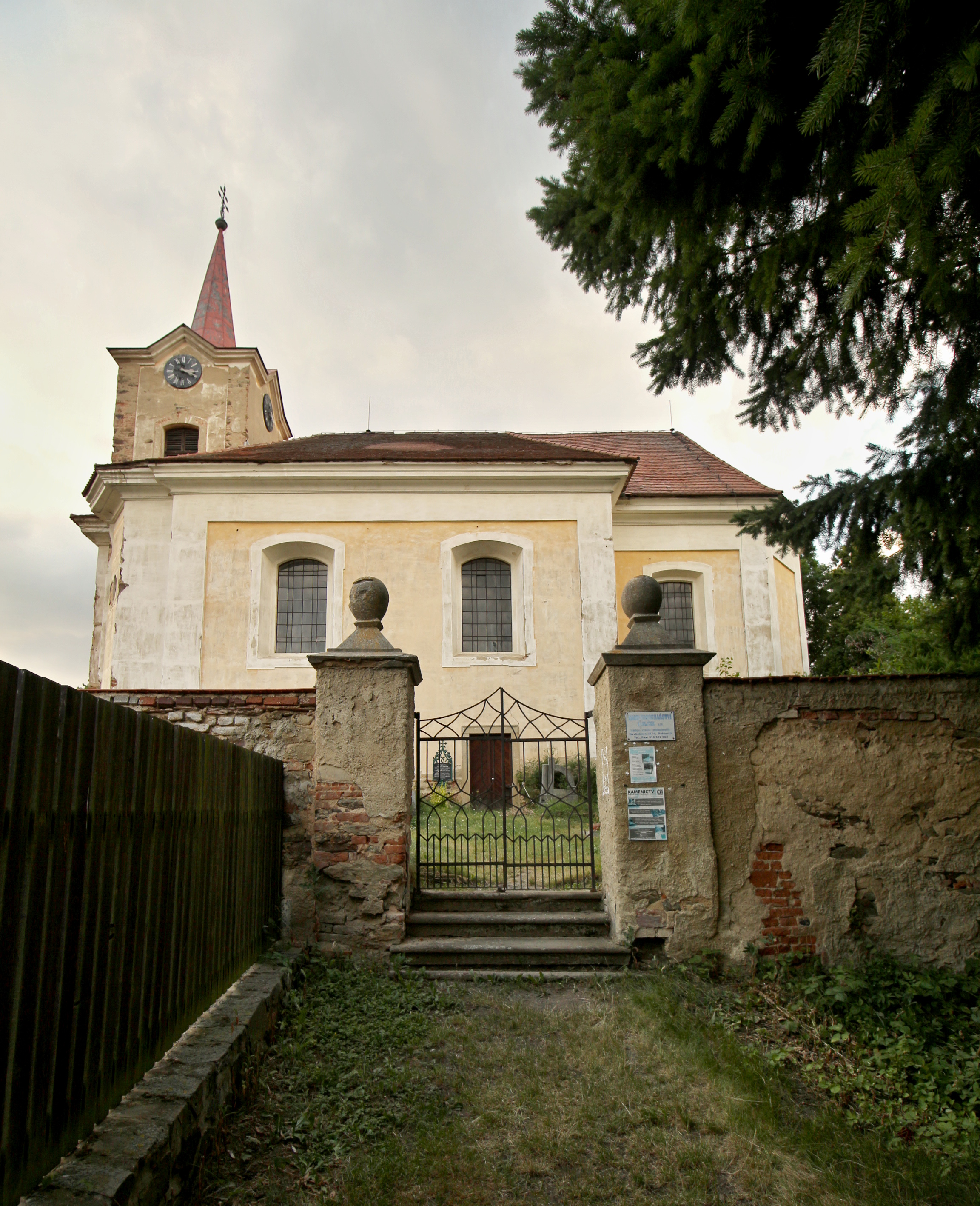 Nový Dům u Rakovníka, kostel svaté Máří Magdalény